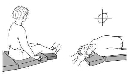 المناورات